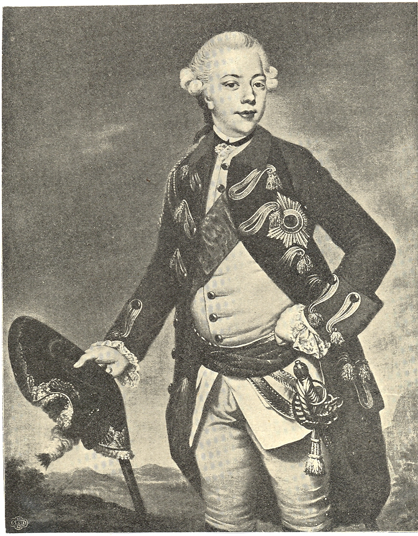 Wilhelm V.